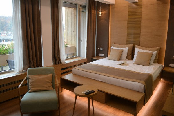 Izgled premium sobe u objektu Merkur Novi.